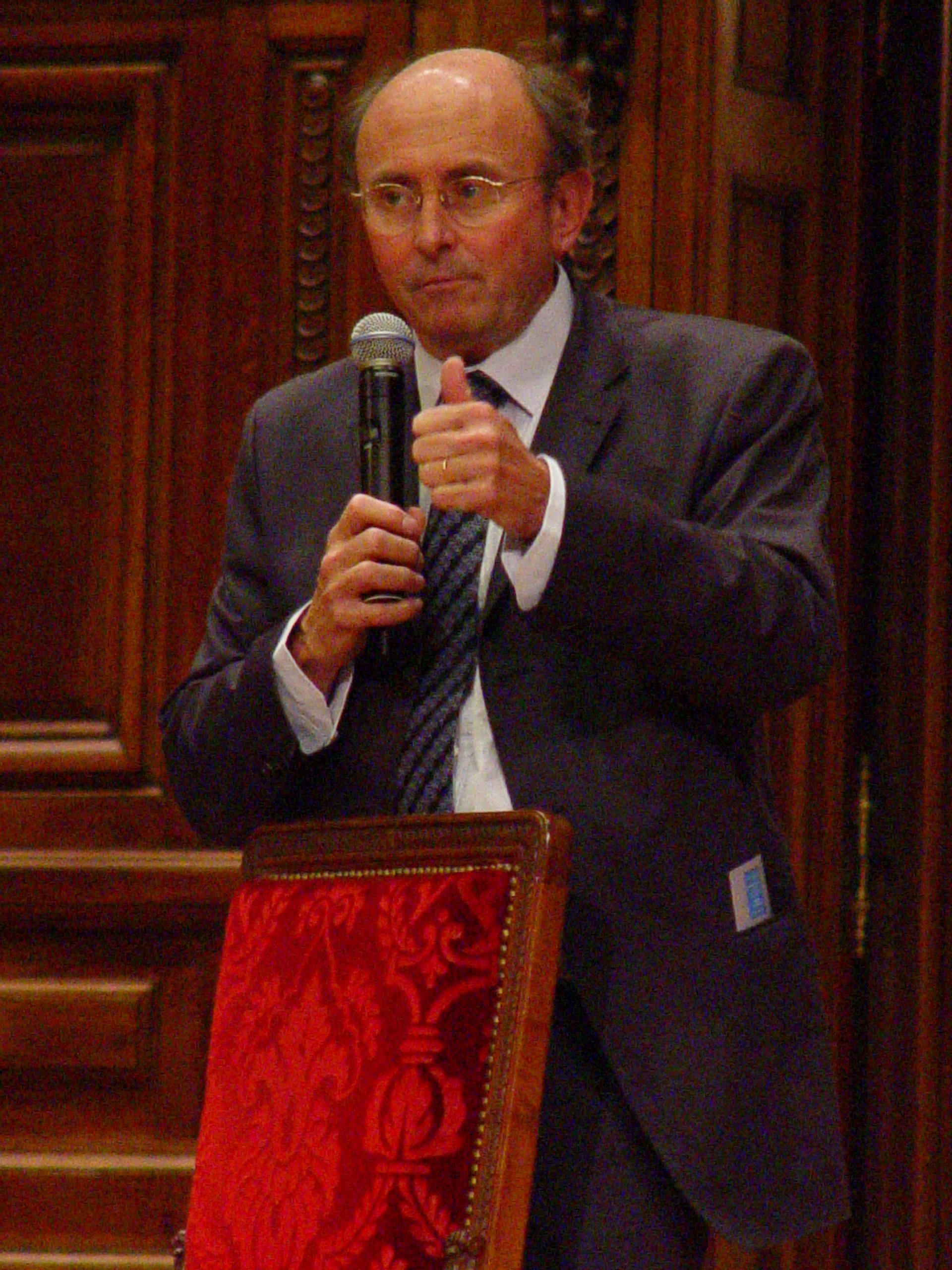 Dominique Wolton à La Sorbonne en IAMCR 2007.